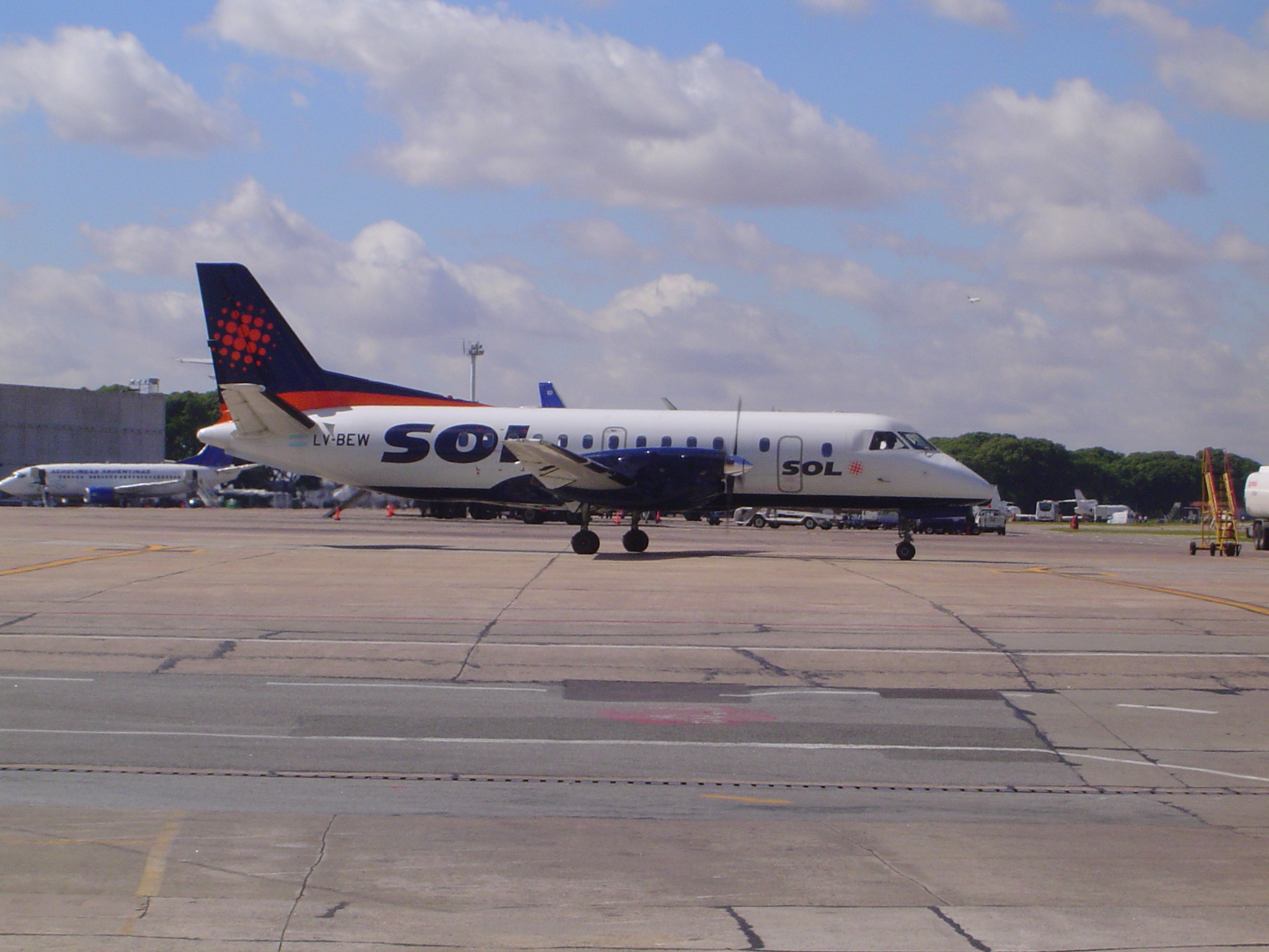 El avión SAAB 340 (LV-BEW) de SOL Lineas Aereas, en el Aeroparque Jorge Newbery. Marzo 2007.